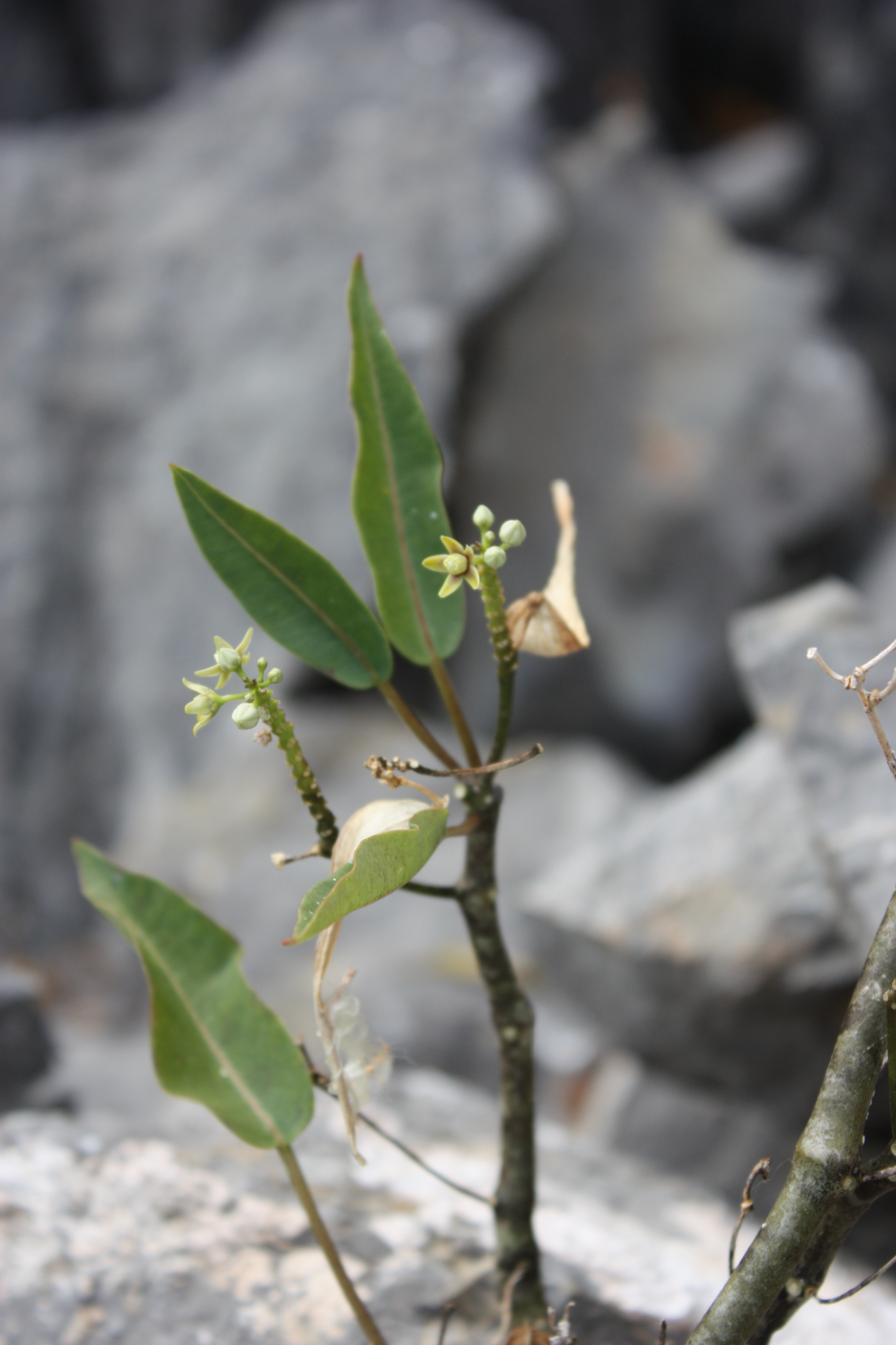 flowering Cynanchum phillipsonianum, Tsingys of Ankarana, N Madagascar